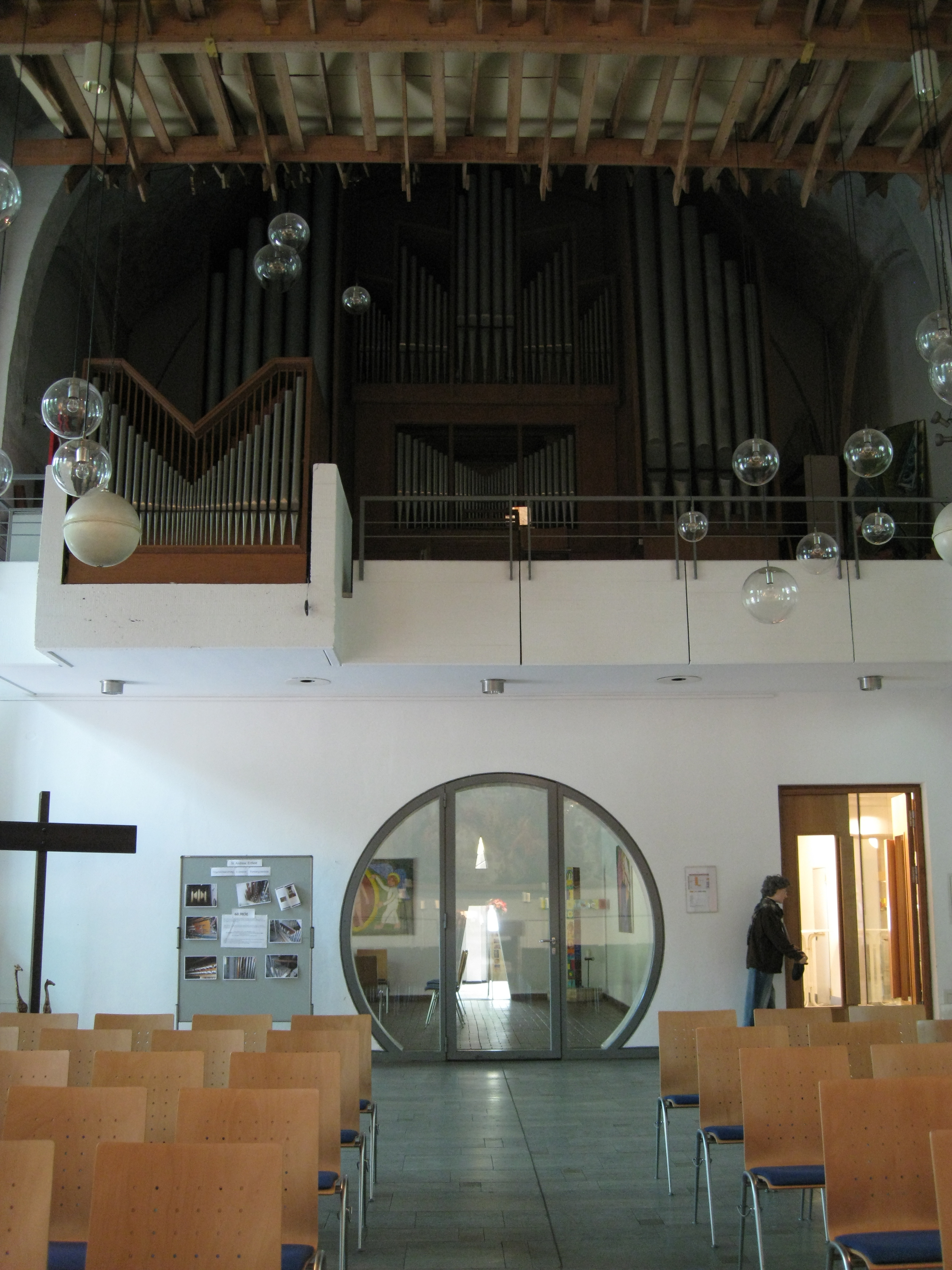 Orgel der Martin-Lutherkirche (Berlin-Neukölln)